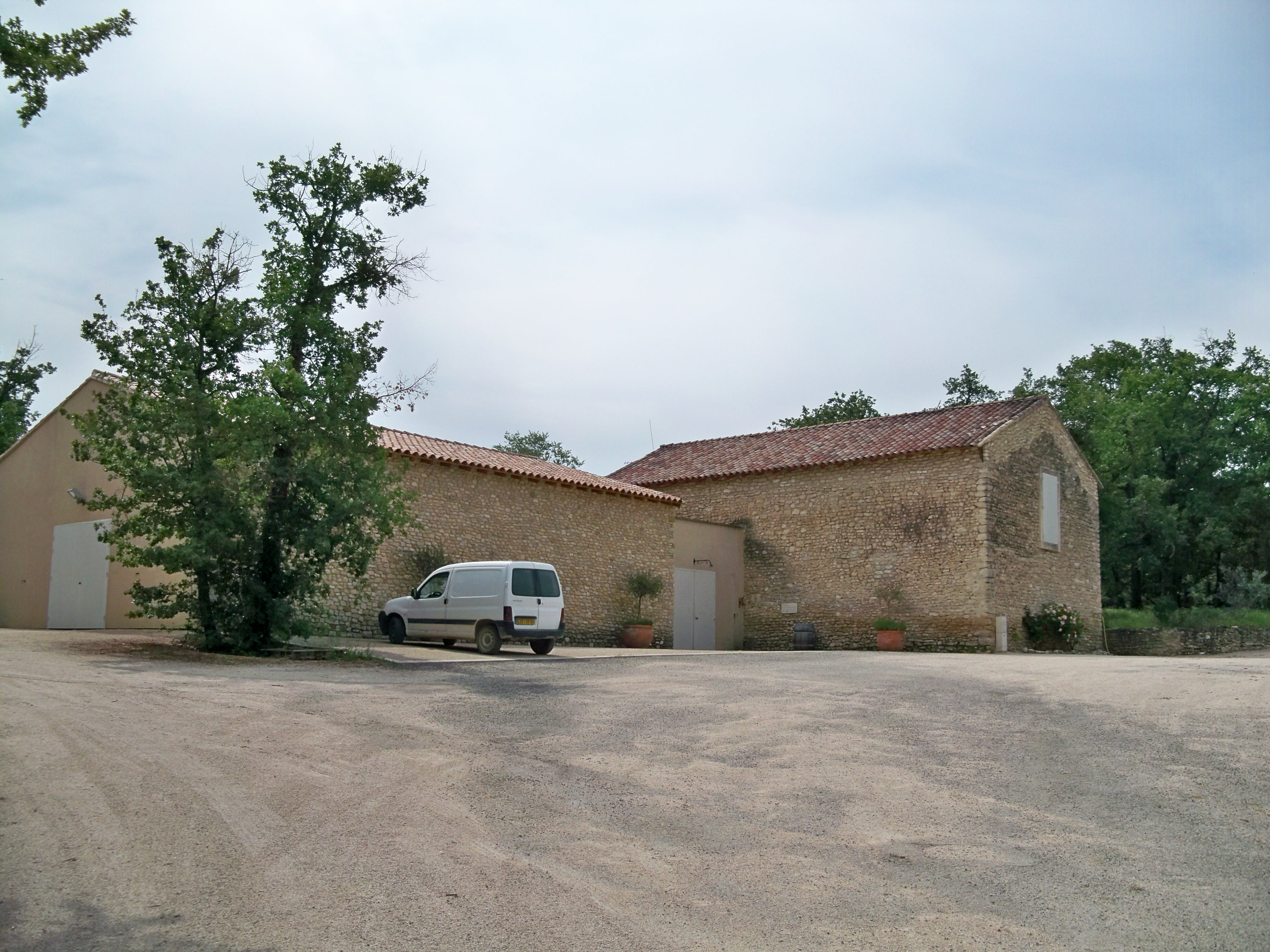 Chateau Unang à Malemort du Comtat (84)